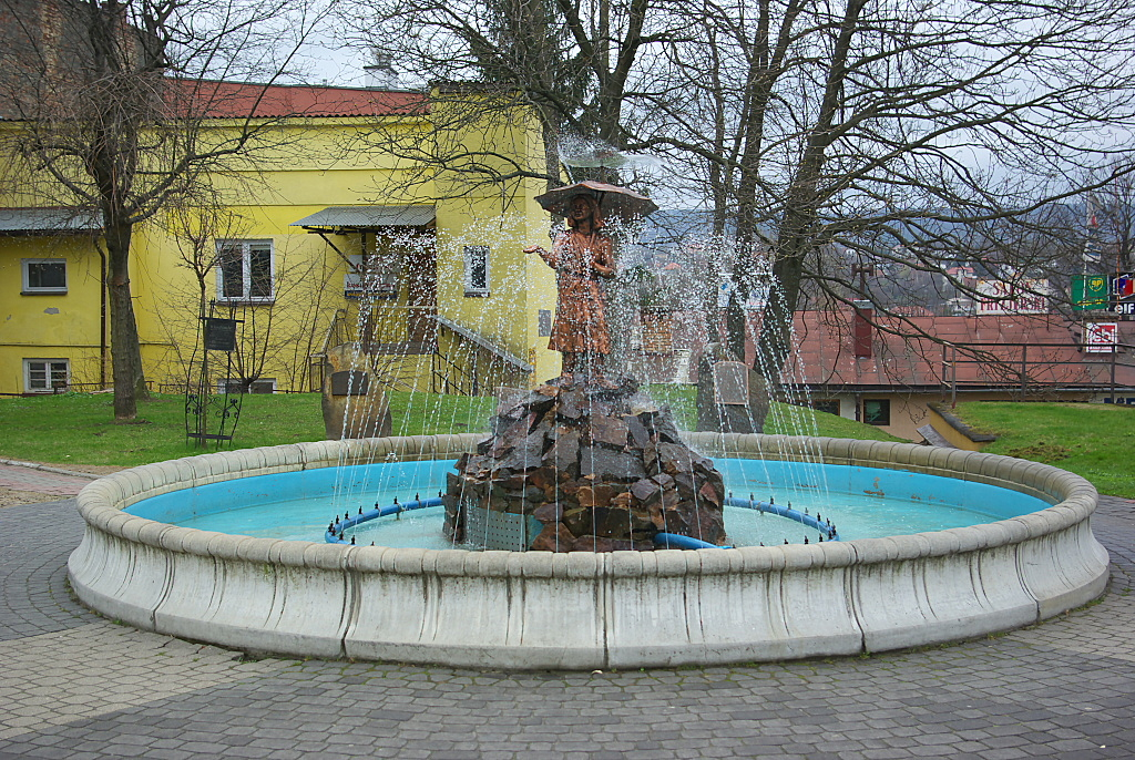 Fontanna Plac Miast Partnerskich in Sanok